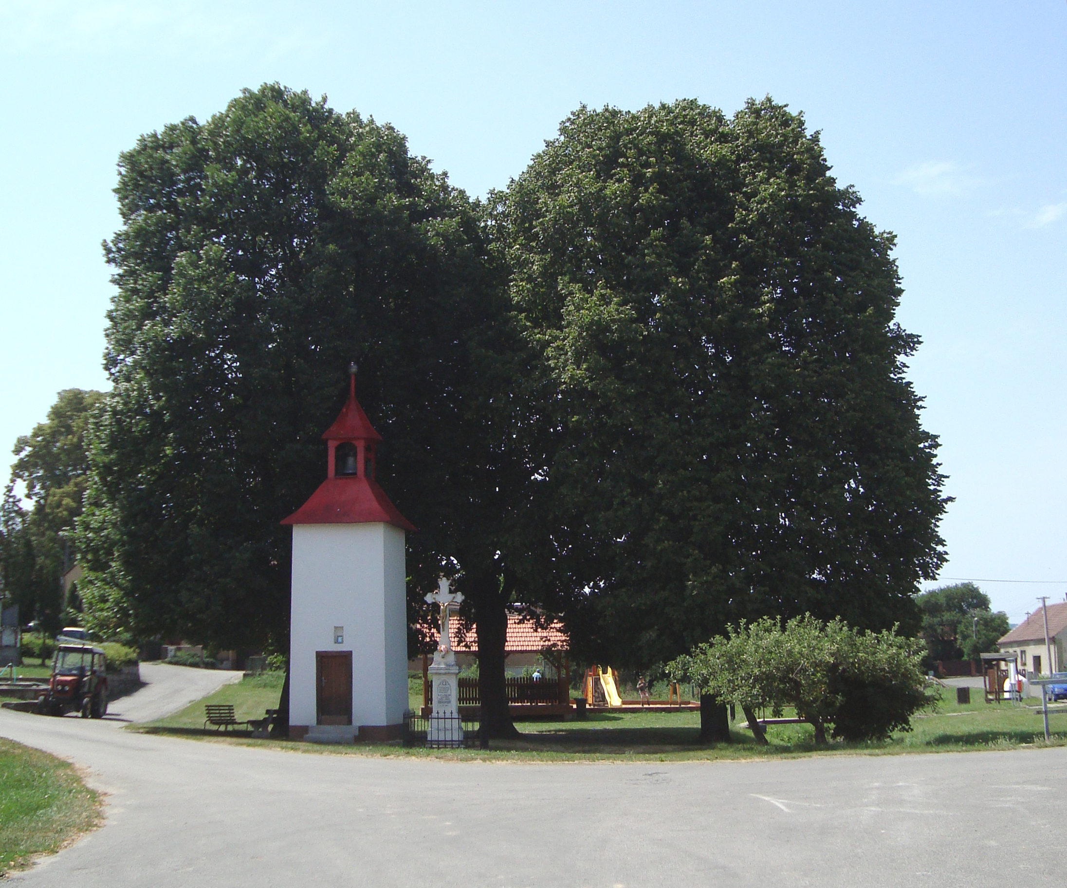 Náves Lhánice, Česká republika, Okres Třebíč